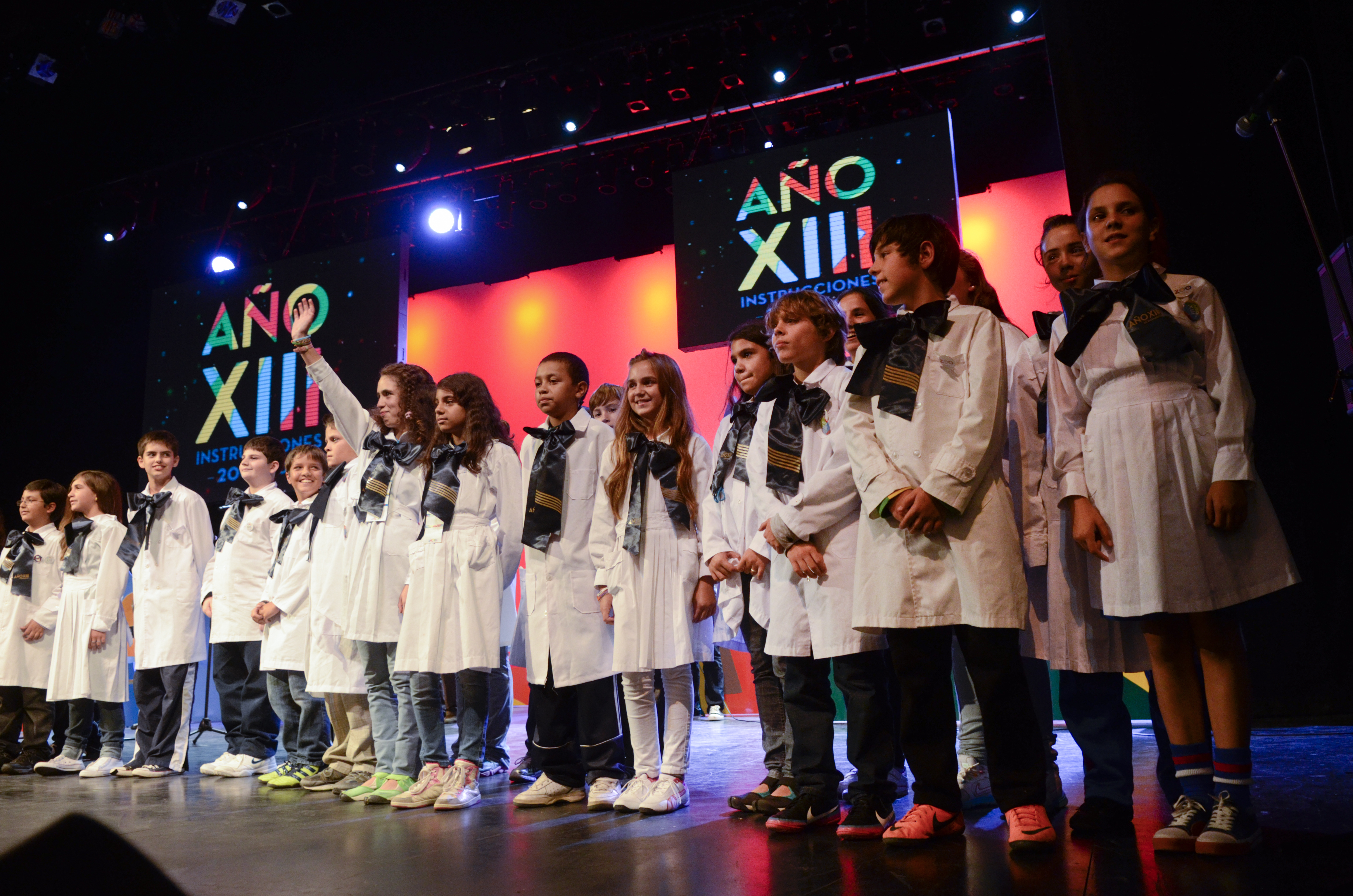 El 3 de abril del año 2011 se realizó en Uruguay, la Ceremonia de Apertura de los Festejos del Año XIII. Dicho evento estuvo enmarcado en las actividades conmemorativas del Bicentenario de Uruguay, las cuales tuvieron lugar durante ese año. En a ceremonia, que tuvo lugar en Montevideo, participaron mas de 500 niños de 19 escuelas de todo el país. La fotografía fue tomada por Andrés Cuenca para la Secretaría del Bicentenario, dependiente de la Comisión del Bicentenario, la cual está conformada por autoridades de todos los partidos políticos, de diferentes Ministerios y organismos públicos de Uruguay. Mail: Web